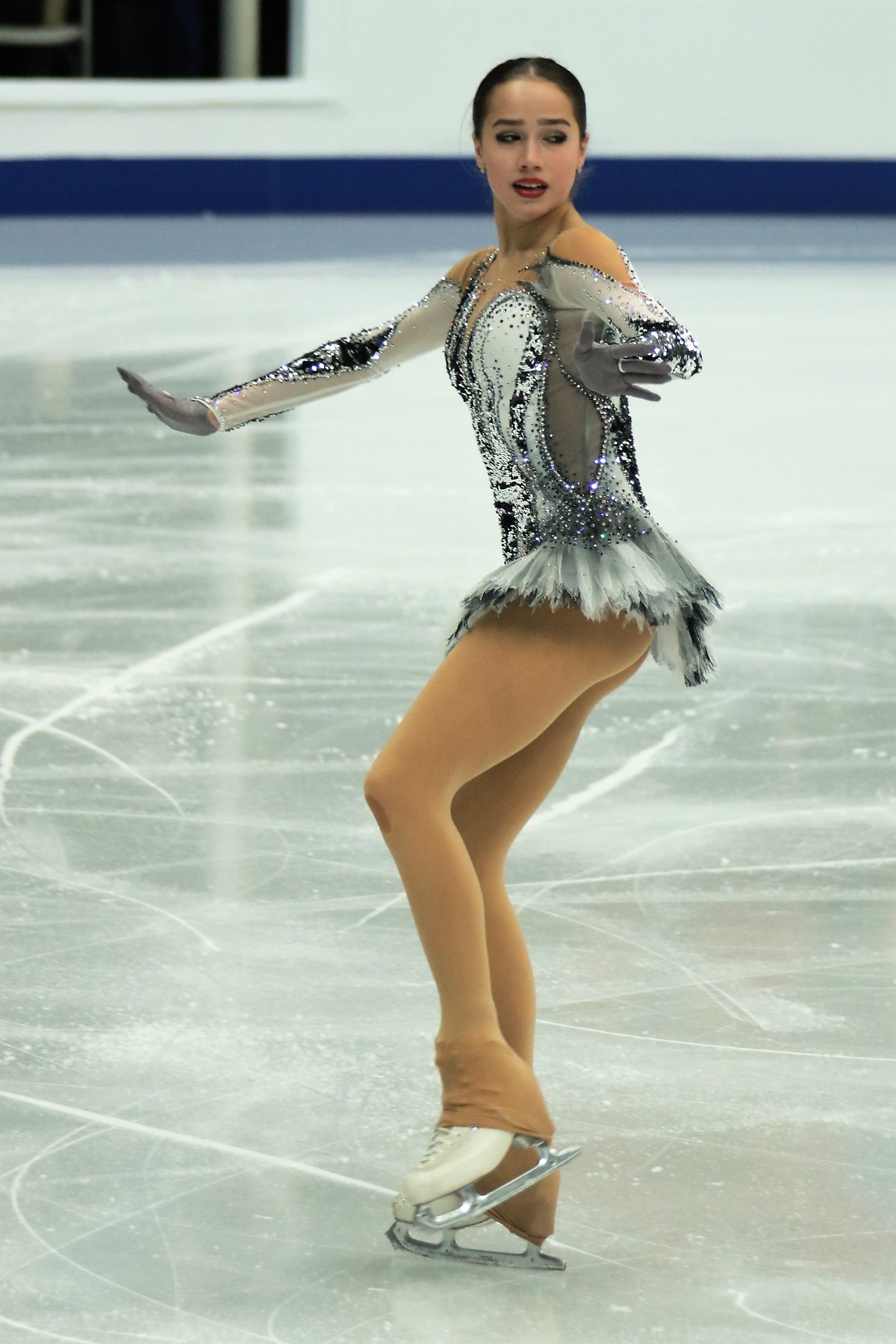 Алина Загитова (Россия) на Чемпионате Европы по фигурному катанию 2018.